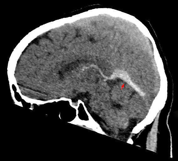 Sinusvenenthrombose sag. MPR Rekonstruktion des Nativ-CCT